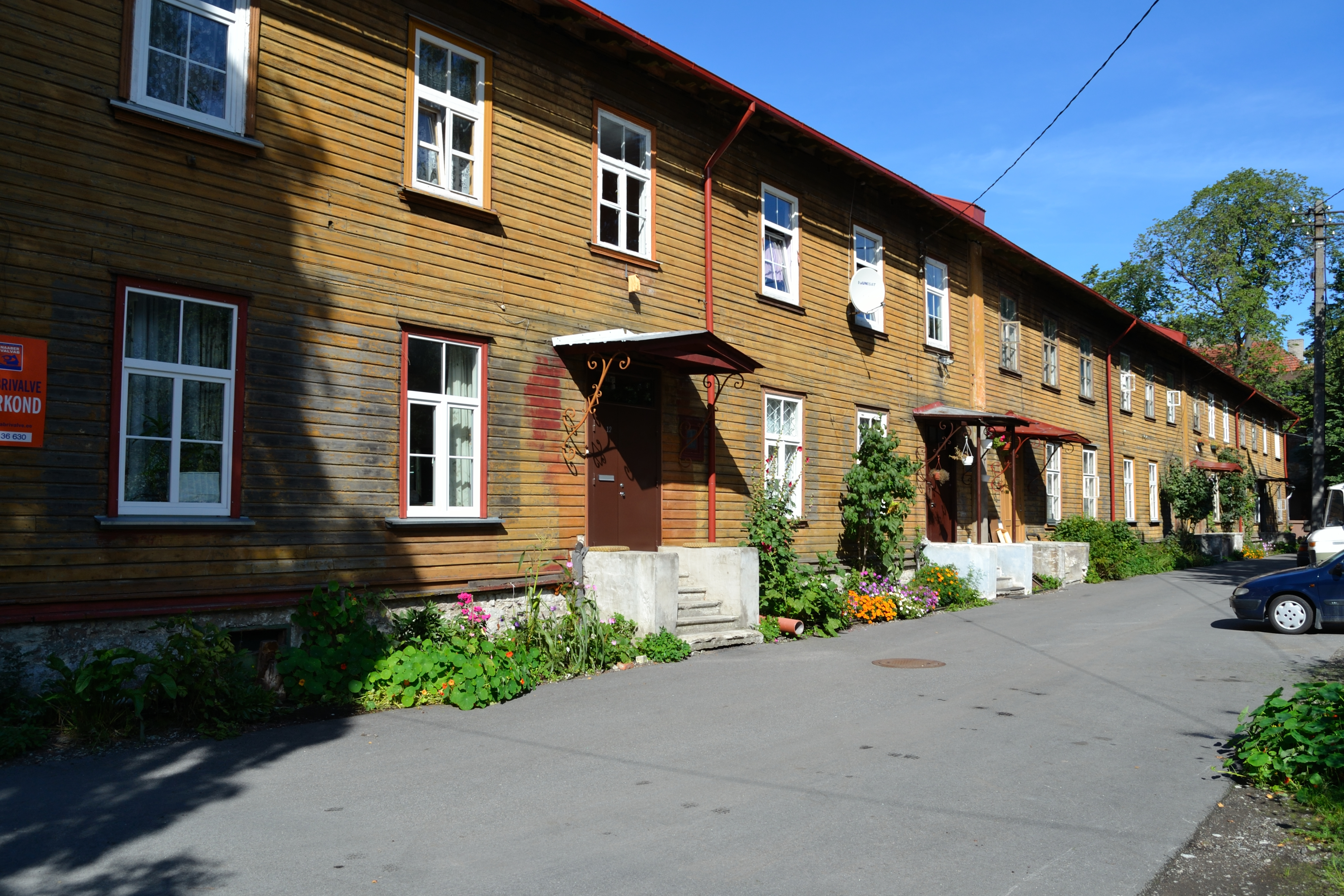 Tallinn, Balti Puuvillavabriku meistrite elamu, 1900